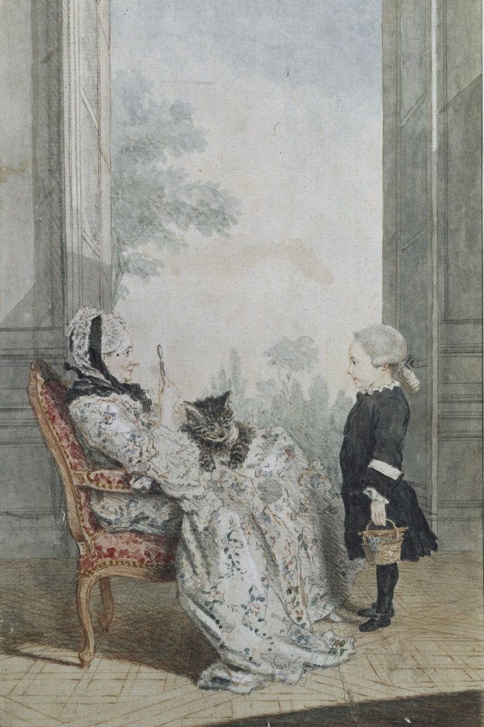 Portrait de Philippe-Angélique de Froissy, comtesse de Ségur (vers 1702-1785) et son petit-fils Joseph-Alexandre, vicomte de Ségur, surnommé le "petit gaillard" (1758-1805). Notice 235, rédigée par : PERATE André, sous le titre : Ségur (Comtesse de), mère du Maréchal, et son petit-fils, le vicomte Joseph-Alexandre de Ségur, enfant